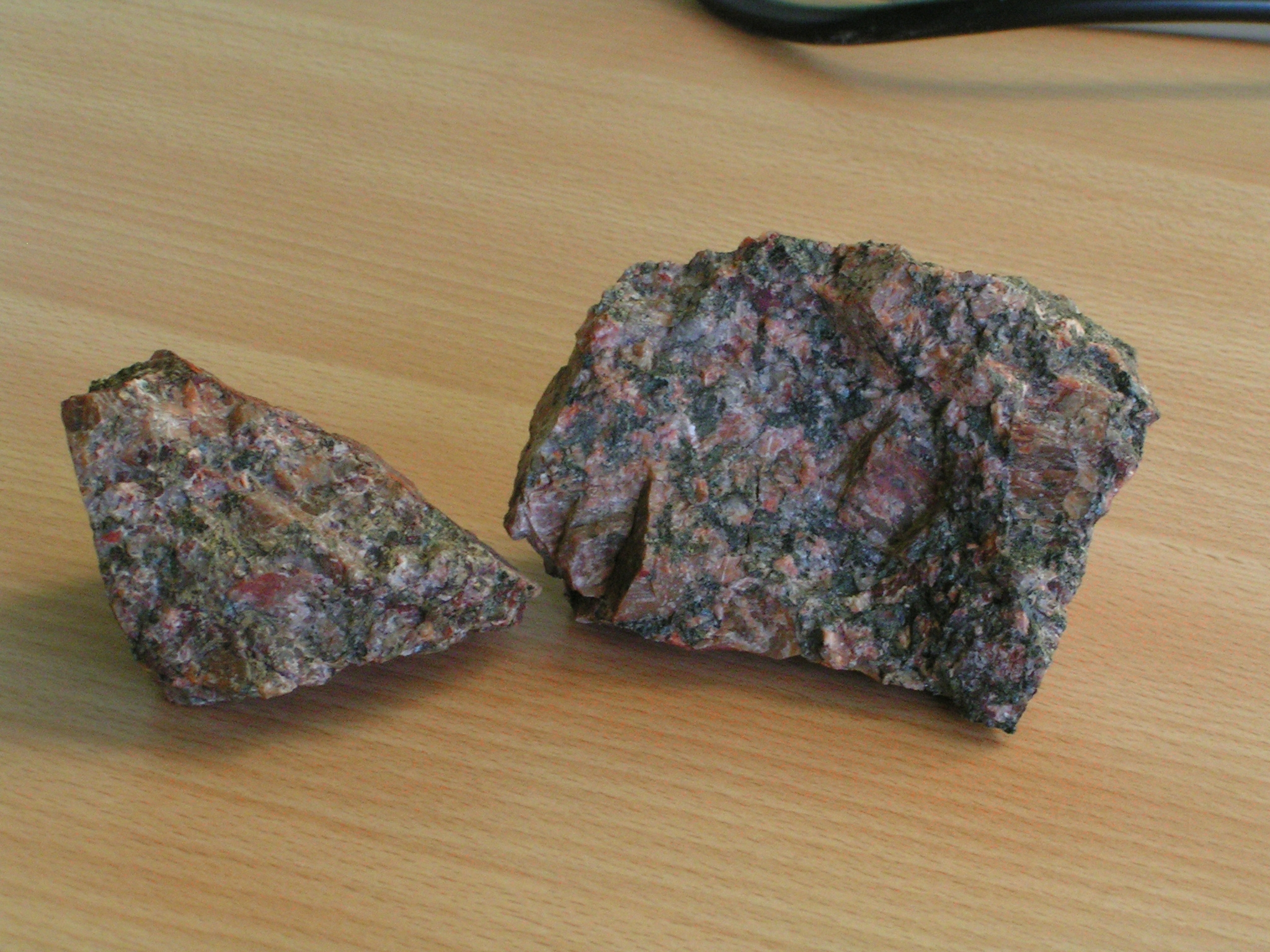 Monzogranite des Ballons datant du Viséen inférieur (col des Croix, Haute-Saône, France). Monzogranite porphyroïde calco-alcalin et potassique à mégacristaux d'orthose rose et à amphibole verte et biotite.